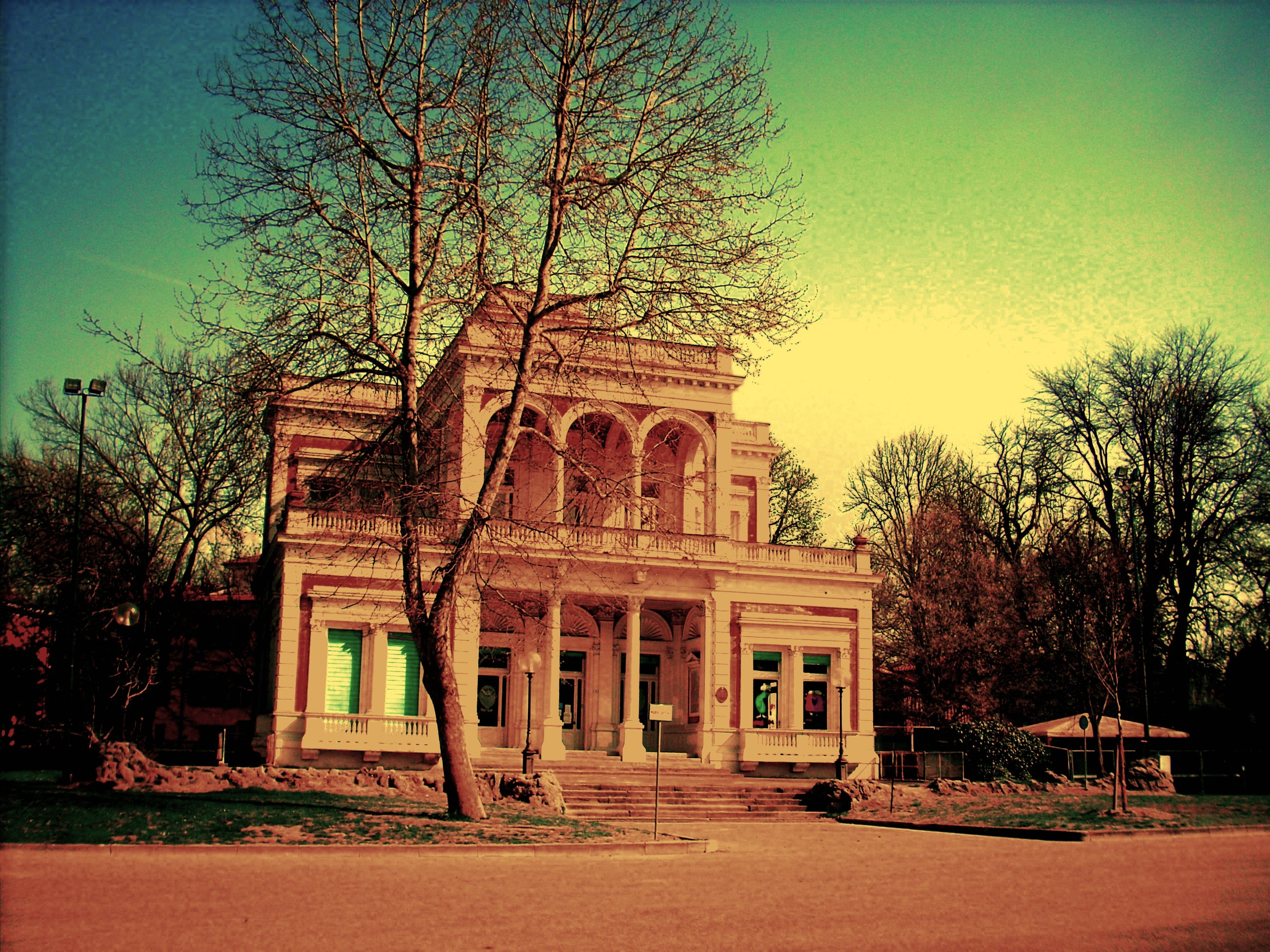 Bologna: Palazzina liberty dei giardini Margherita, osservatorio astronomico.